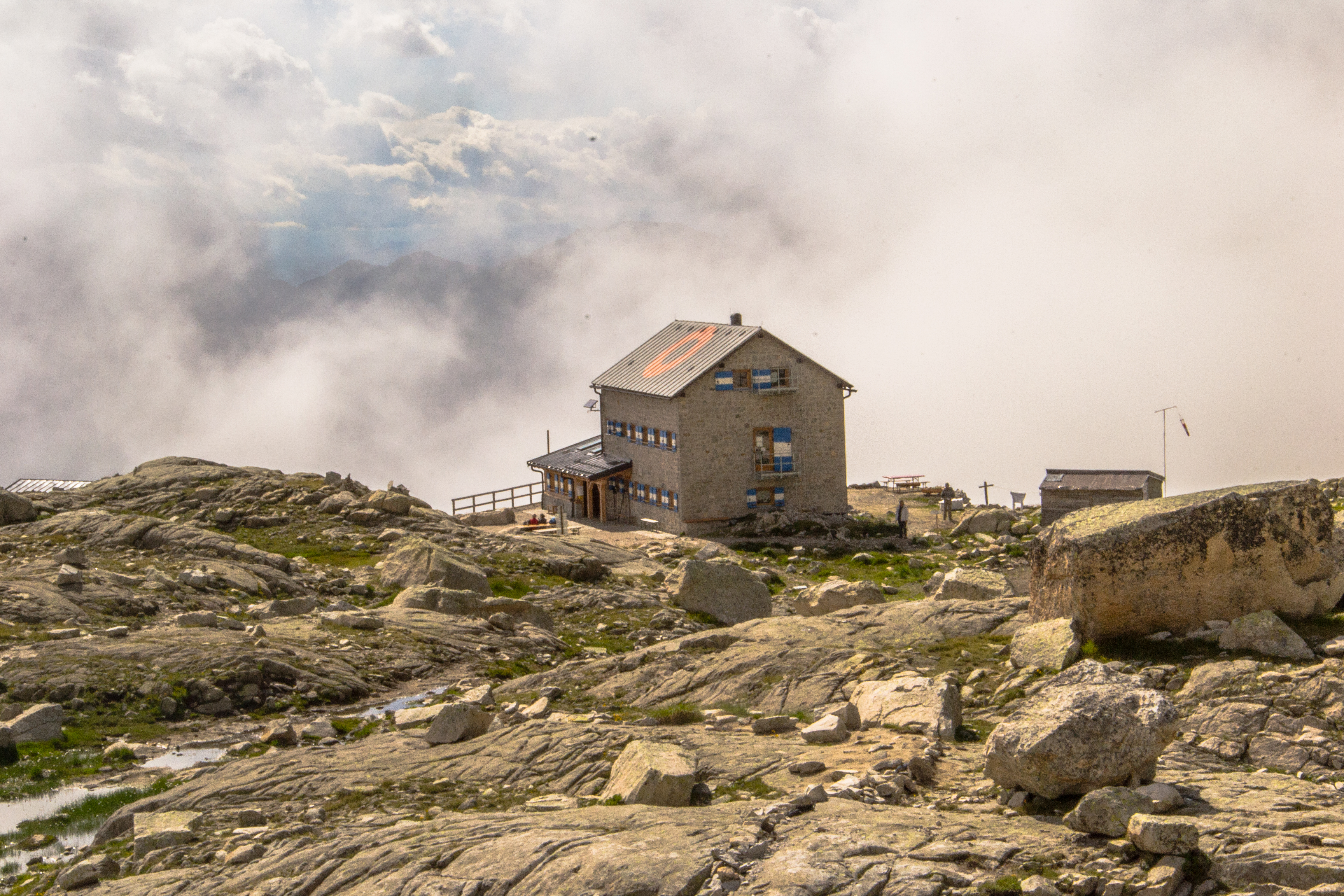 Lagorai (Q47493713)